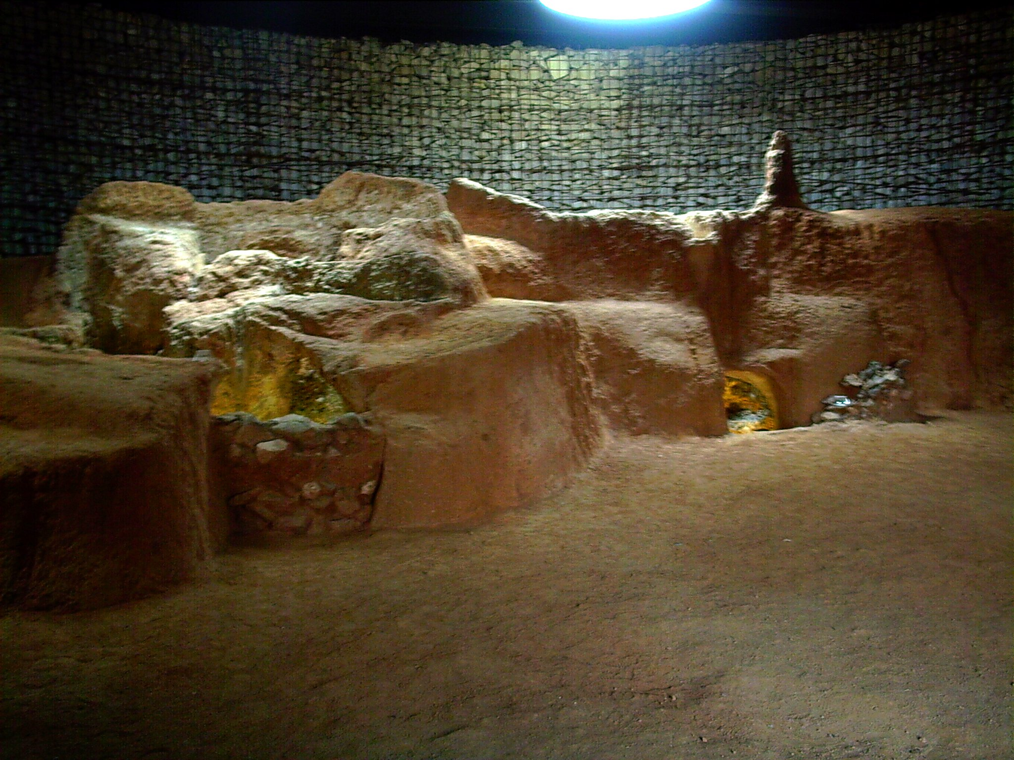 A l'esquerra es pot observar la boca del forn 1, que es troba paredada. Forns romans de la Fornaca, a Vilassar de Dalt, el Maresme, (Catalunya).